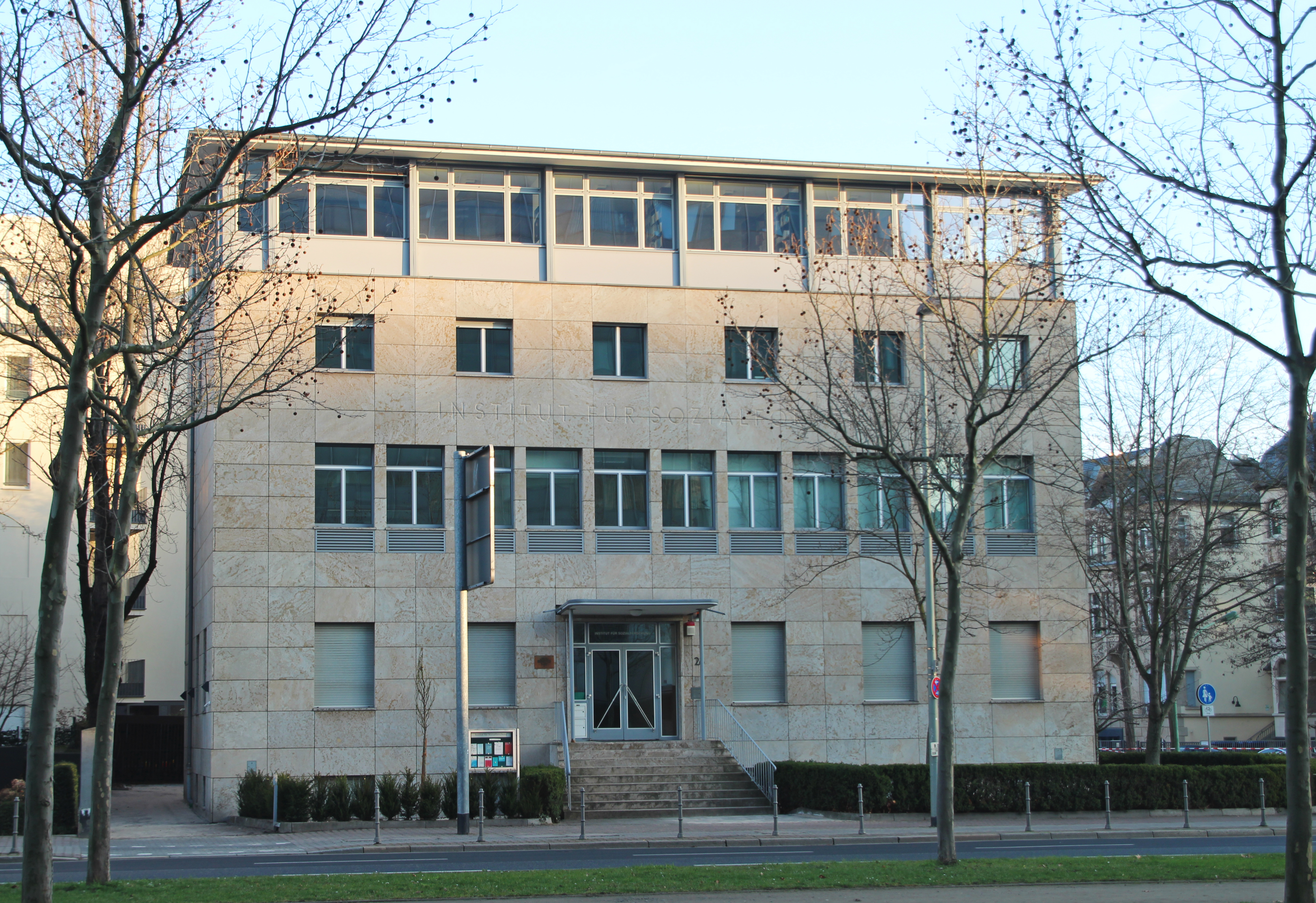 Bildinhalt: Institut für Sozialforschung Aufnahmeort: Frankfurt am Main, Deutschland